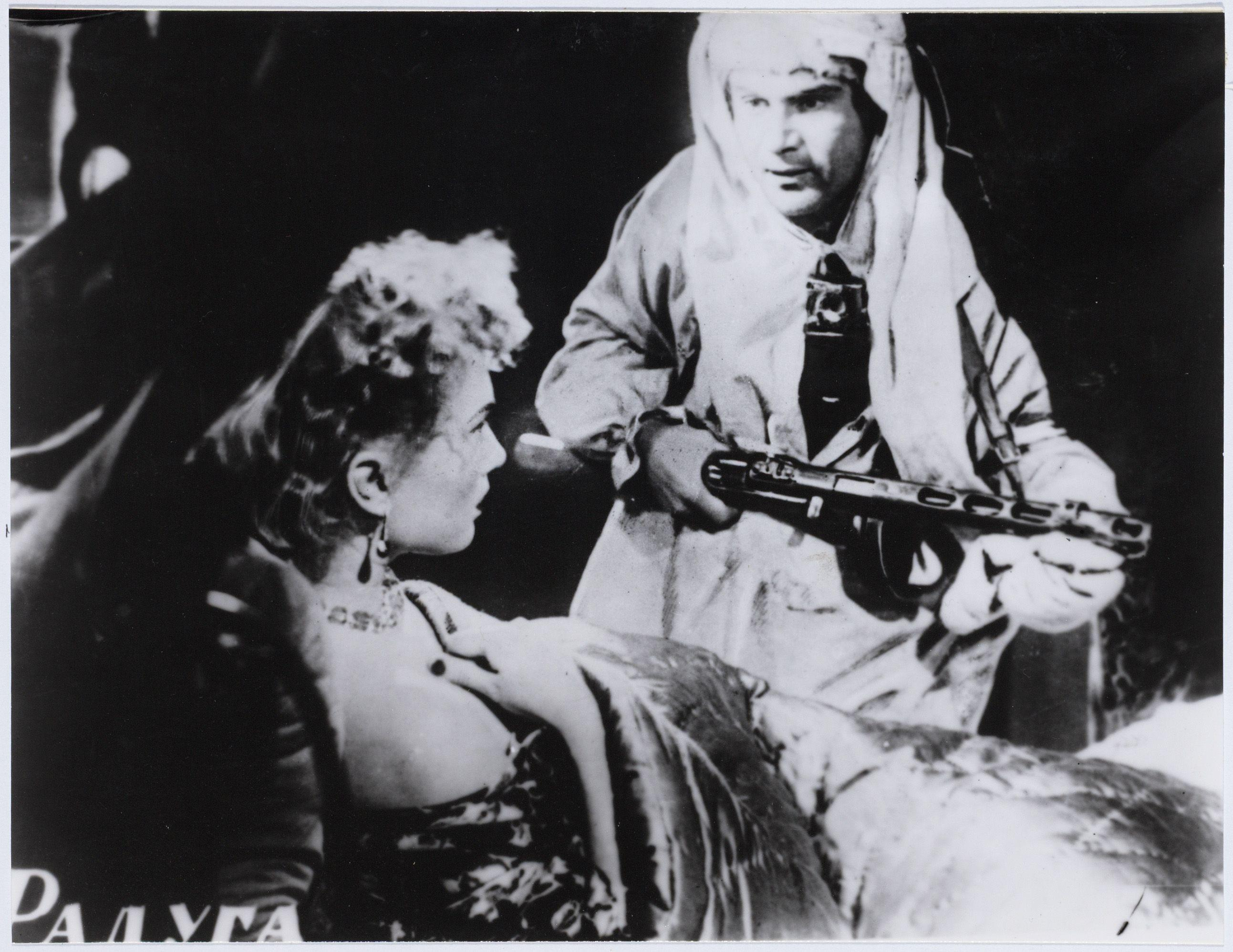 Beschrijving Opname uit Russische film Raduga (de Regenboog) Regie: Mark Donskoi, 1944. Uitgebracht in Nederland: 1944. Documenttype foto Vervaardiger Merkelbach, Atelier J. Collectie Collectie Atelier J. Merkelbach Datering 1944 Inventarissen Afbeeldingsbestand 010003038436 Generated with Dememorixer